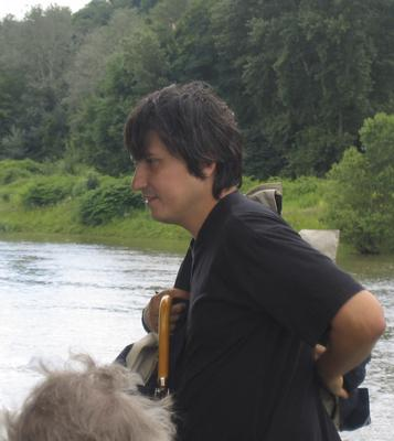 Maxime Kontsevich, mathématicien russe, à Bonn en 2007